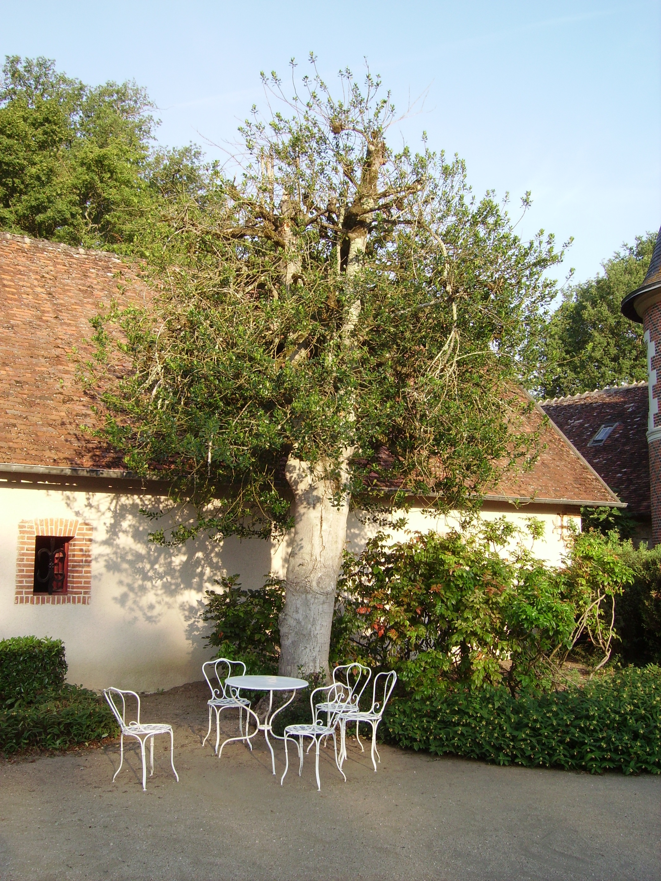 Château of Troussay, France. holy tree in court. Château de Troussay, France, Loir et Cher. Houx de la cour d'honneur.